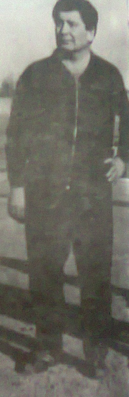 Miguel Ubaldo Ignomiriello